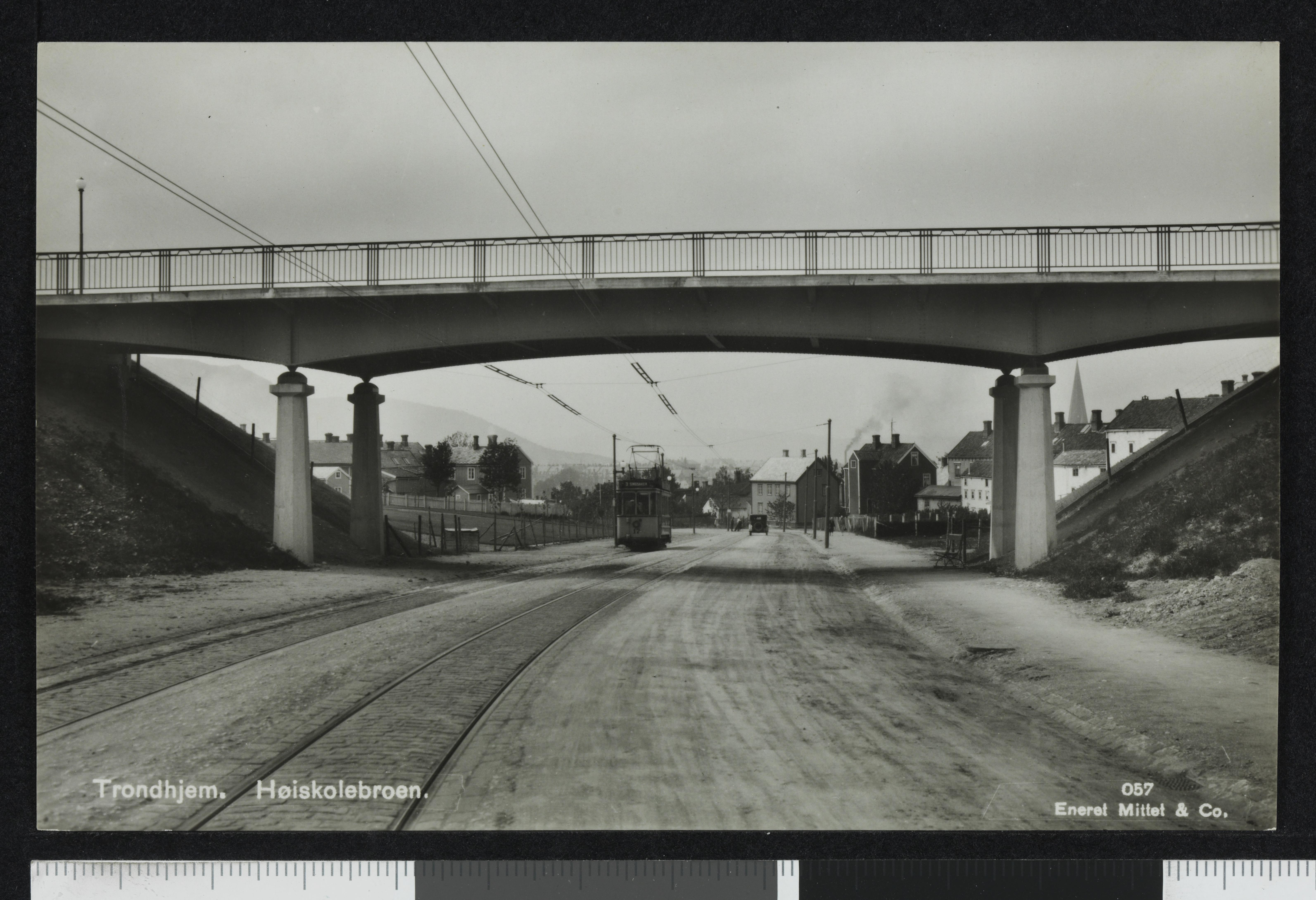 Bildet er hentet fra Nasjonalbibliotekets bildesamling Gløshaugen,Høyskolebrua, Trondheim, Sør Trøndelag